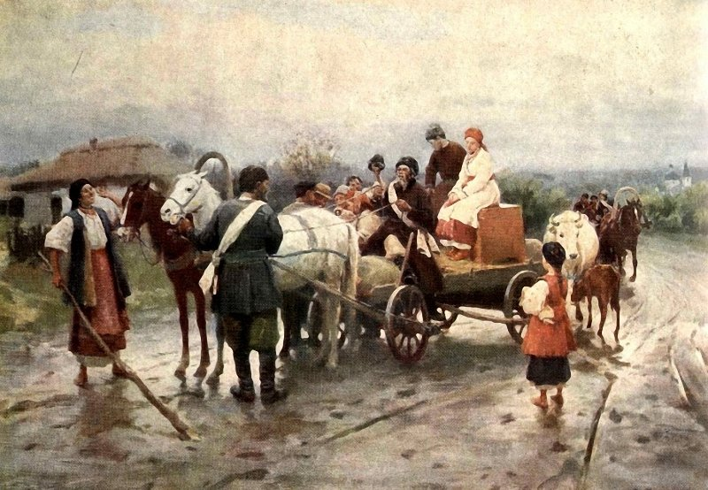 Н. К. Пимоненко. Выкуп невесты. 1908 г. «Свадьба в Малороссии».